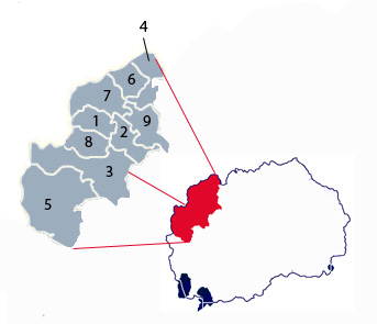 Map of Polog Statistical Region in Macedonia.Мапа на полошки регион во Македонија.